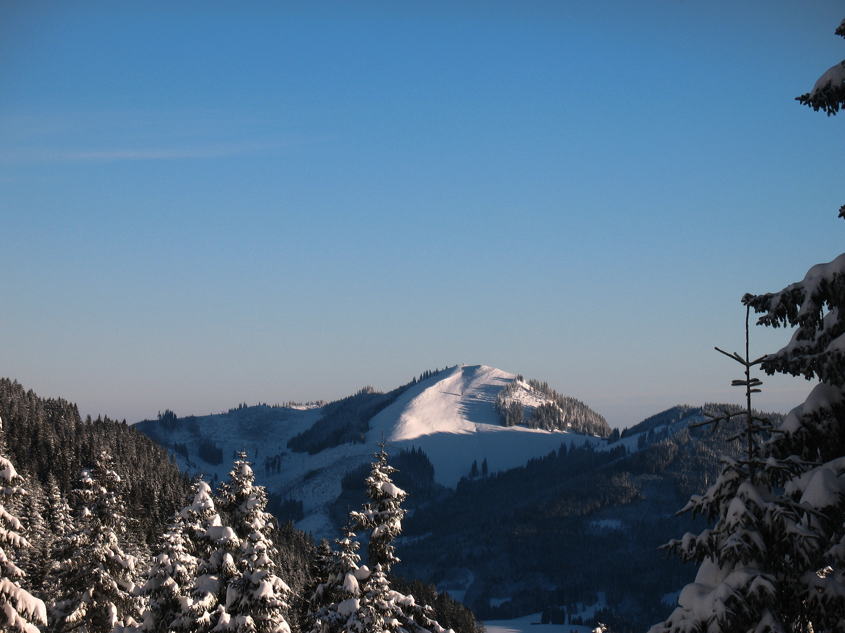 Blick vom Wertacher Hörnle auf die Reuterwanne (1542 m).